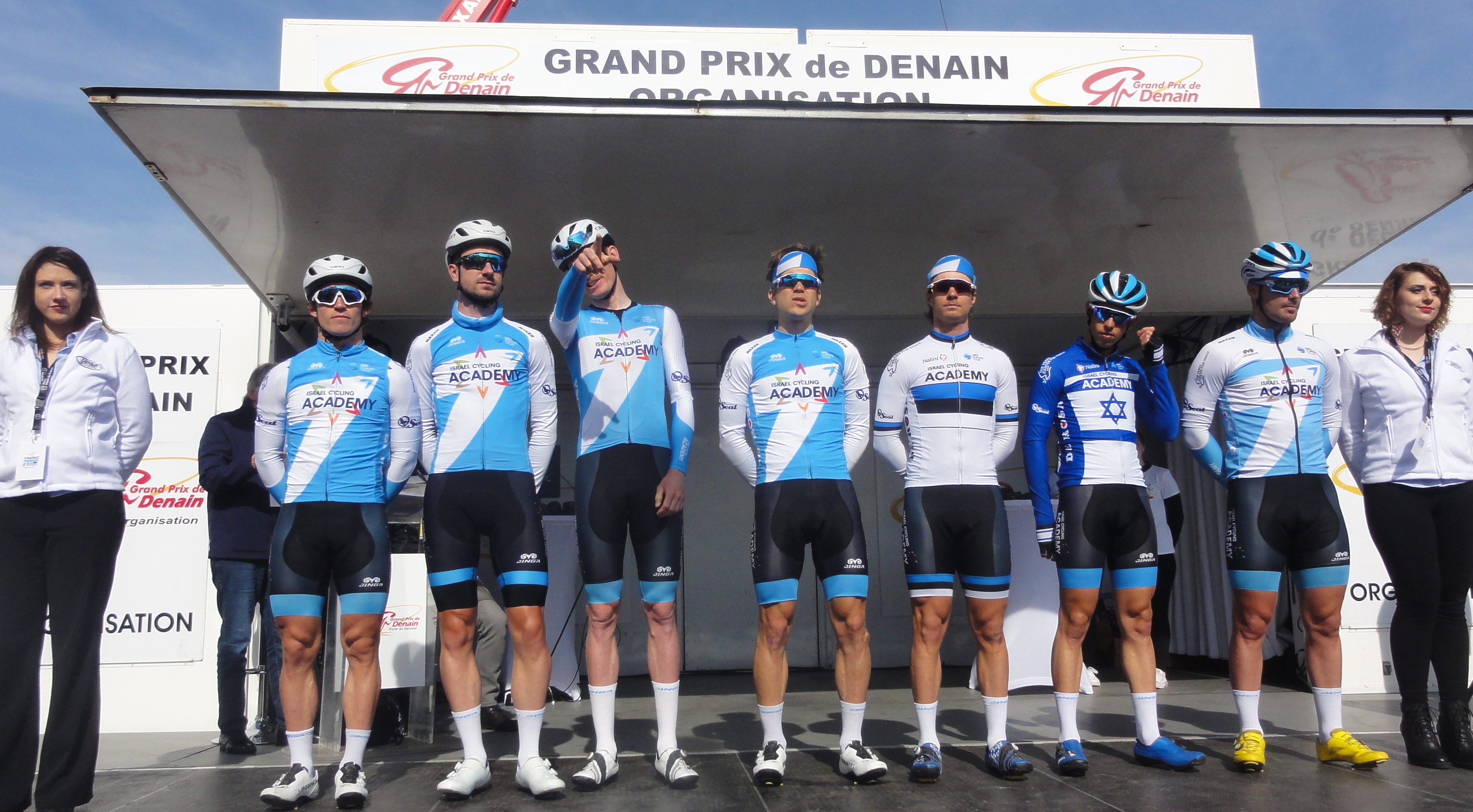 Reportage réalisé le dimanche 24 mars à l'occasion du départ et de l'arrivée du Grand Prix de Denain 2019 à Denain, Nord, Nord-Pas-de-Calais-Picardie, France.